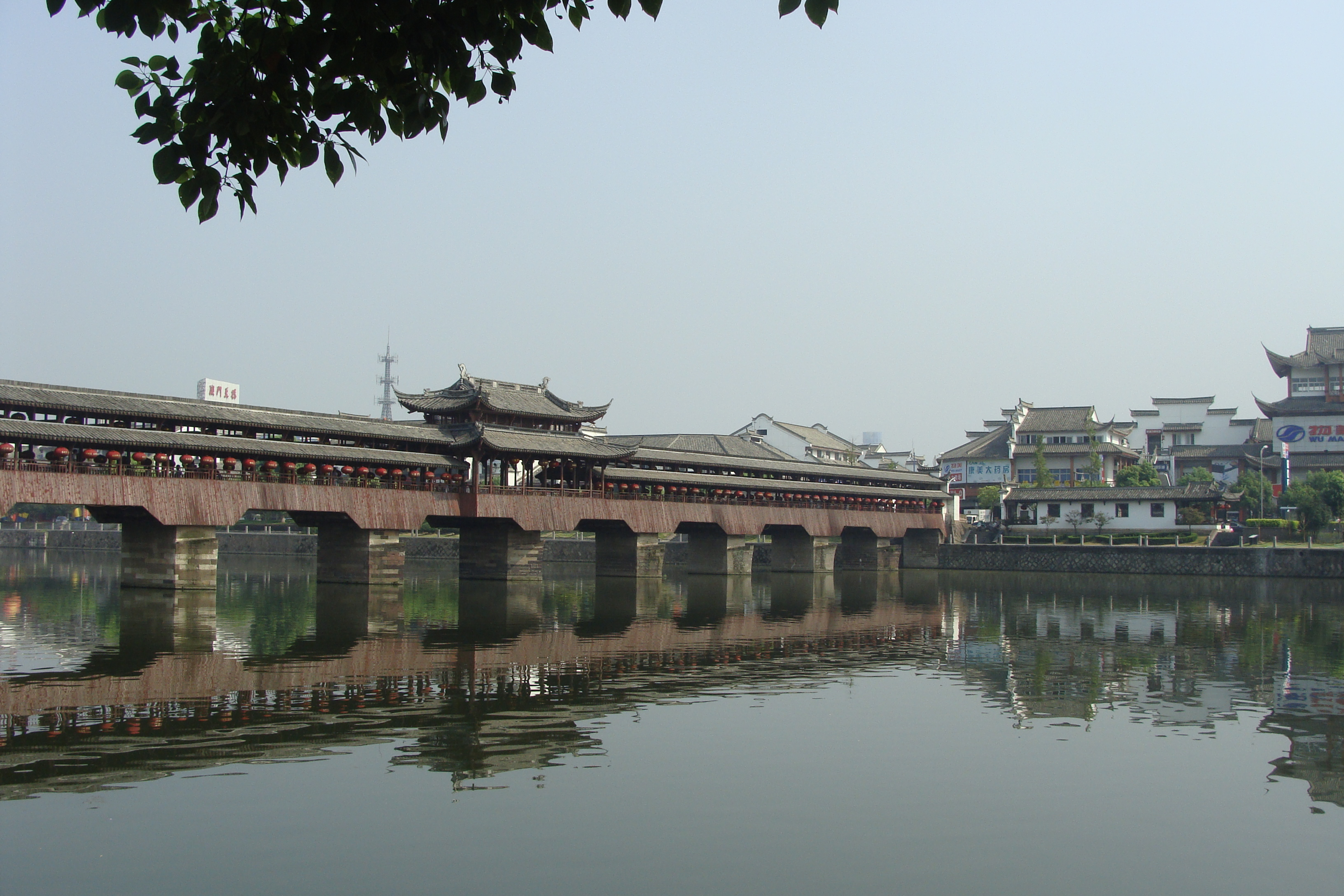 中国浙江省永康市西津桥